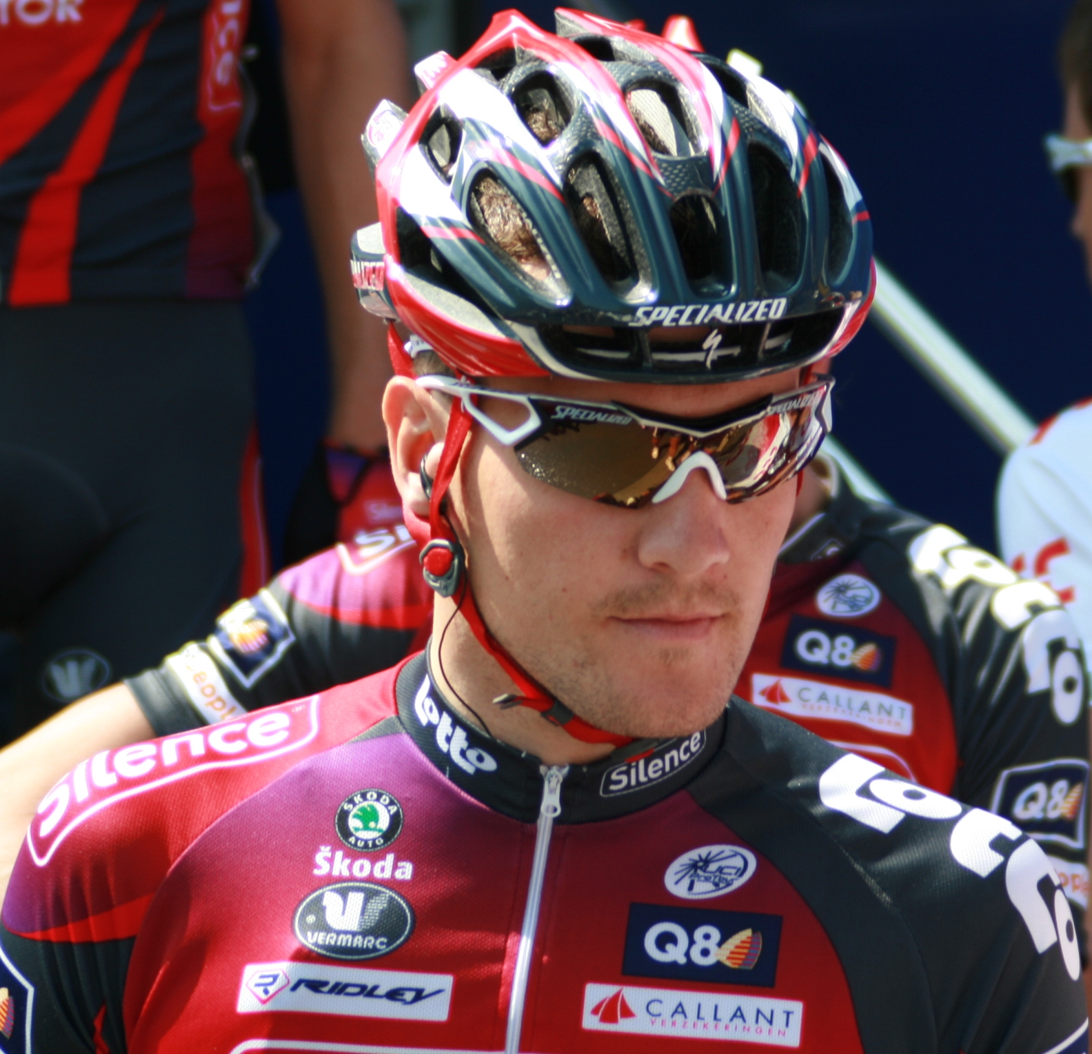 Roy Sentjens aux Quatre jours de Dunkerque 2008